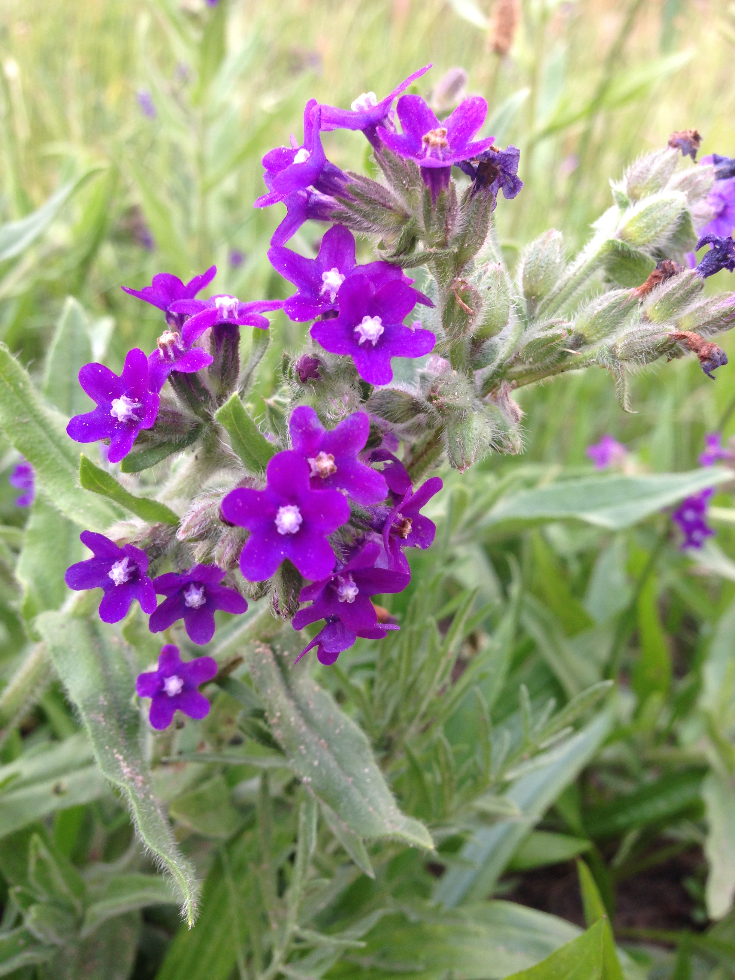 Orvosi atracél (Anchusa officinalis)